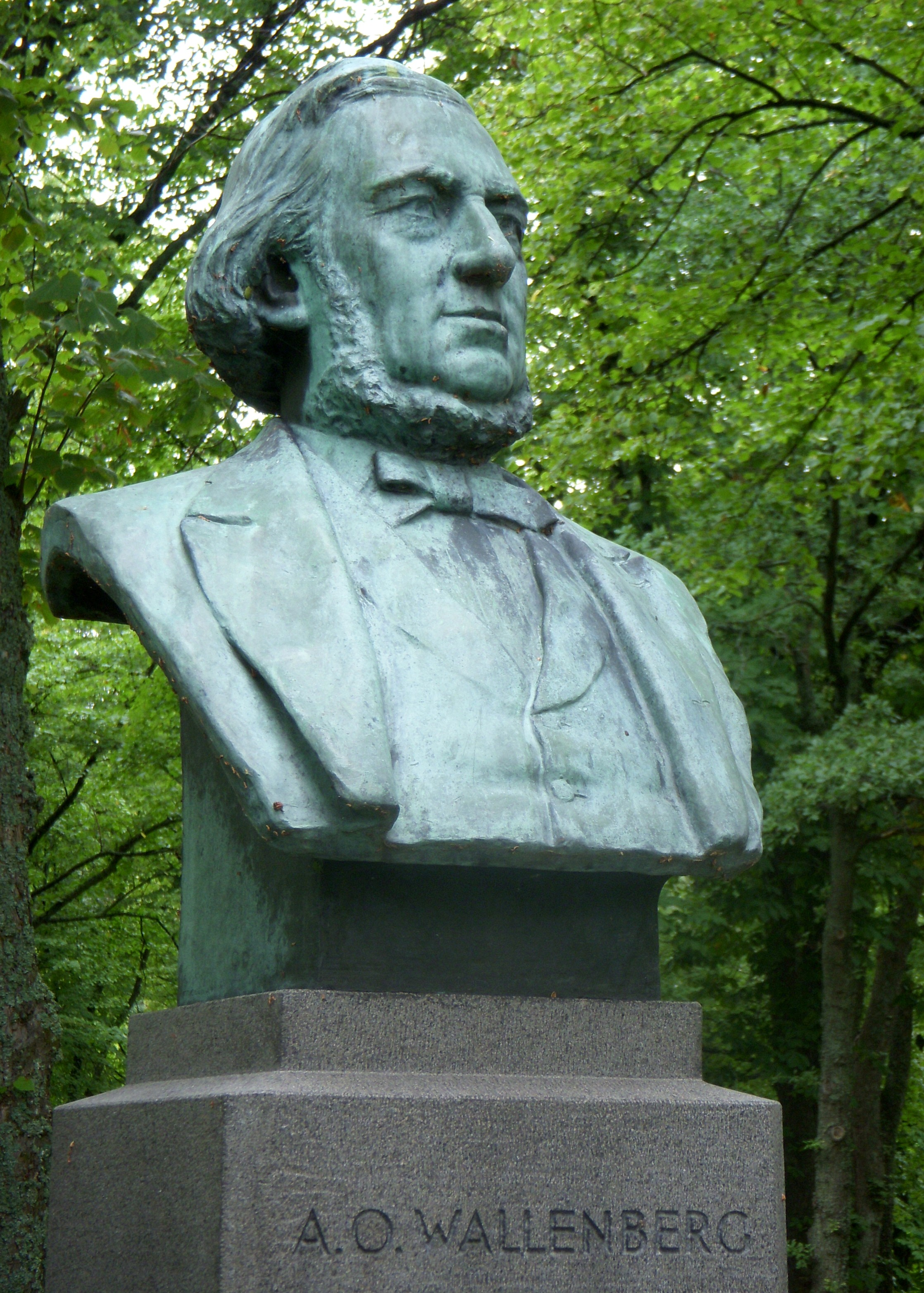 André Oskar Wallenberg (1816-1886), byst vid Wallenberg-mausoleum på Lindö, Ekerö kommun